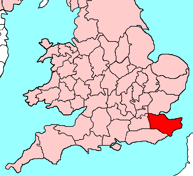 Kent